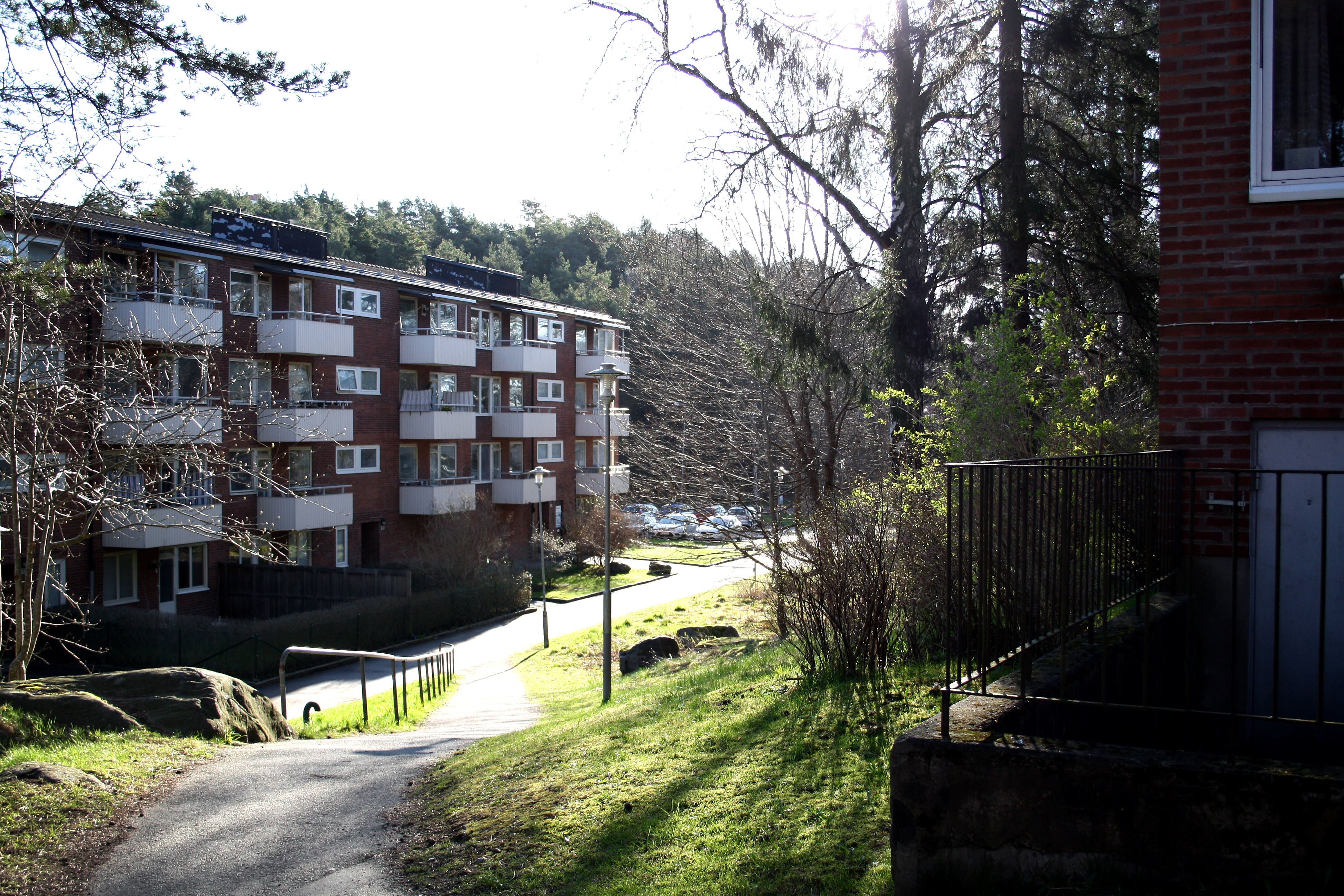 Nedförsbacke från Solståndsgatan i Kortedala, Göteborg. 14 april 2017.